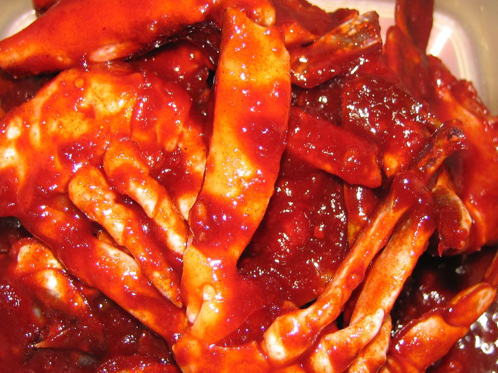 Yangnyeom gejang, marinated crabs in gochujang (chili pepper paste)